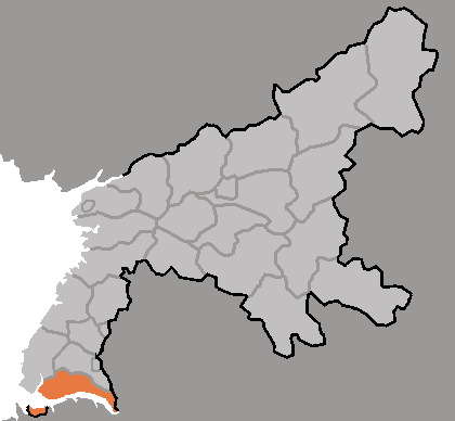 Map of Nampo, Pyongan-namdo, DPRK, 2006